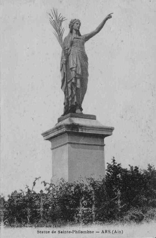 Carte postale représentant Sainte Philomène, statue située à l'entrée d'Ars-sur-Formans dans l'Ain, réalisée par Charles Dufraine, exposée une fois en 1884 à la Société des Amis des Arts de Lyon, et exécutée en bronze par Villard et Tourniers.